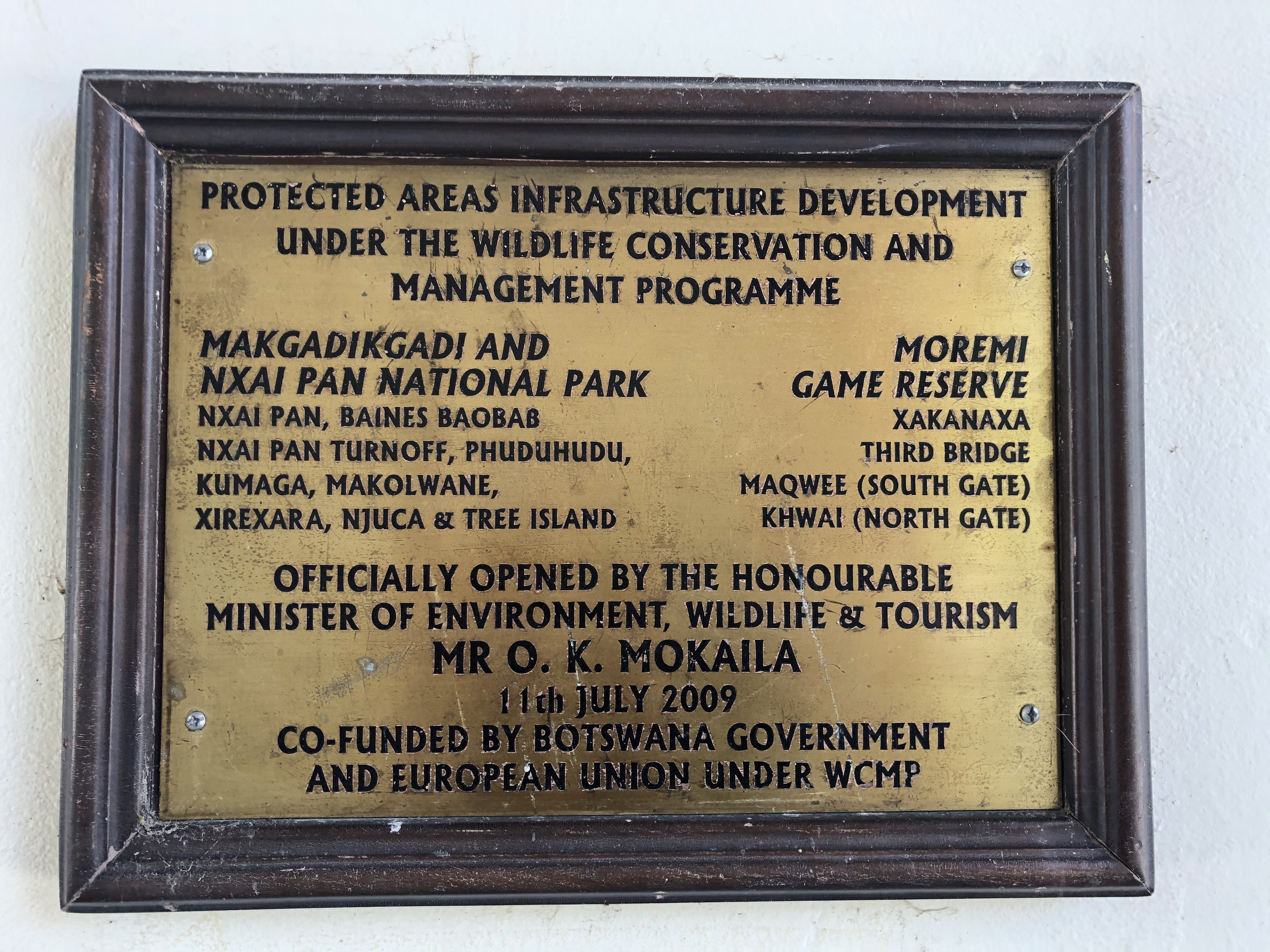 Moremi-Wildreservat) Infotafel beim Gate